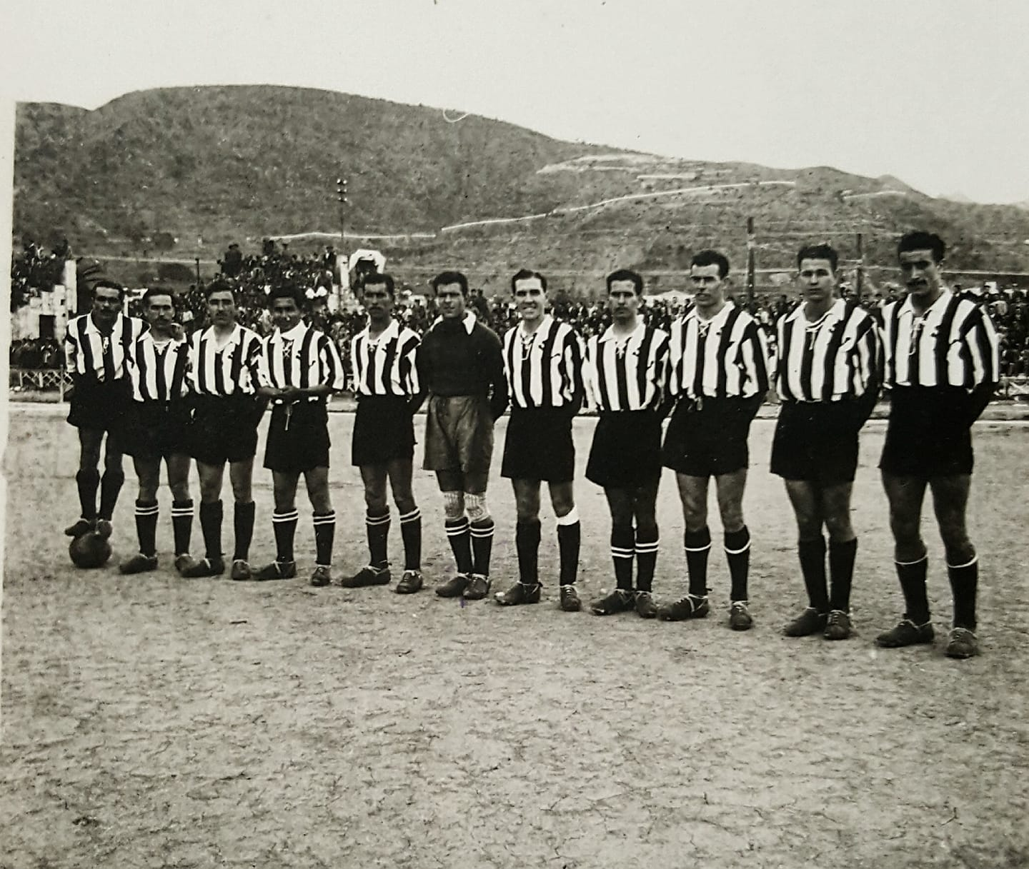 El Club Deportivo Iberia (Tenerife) Años 40